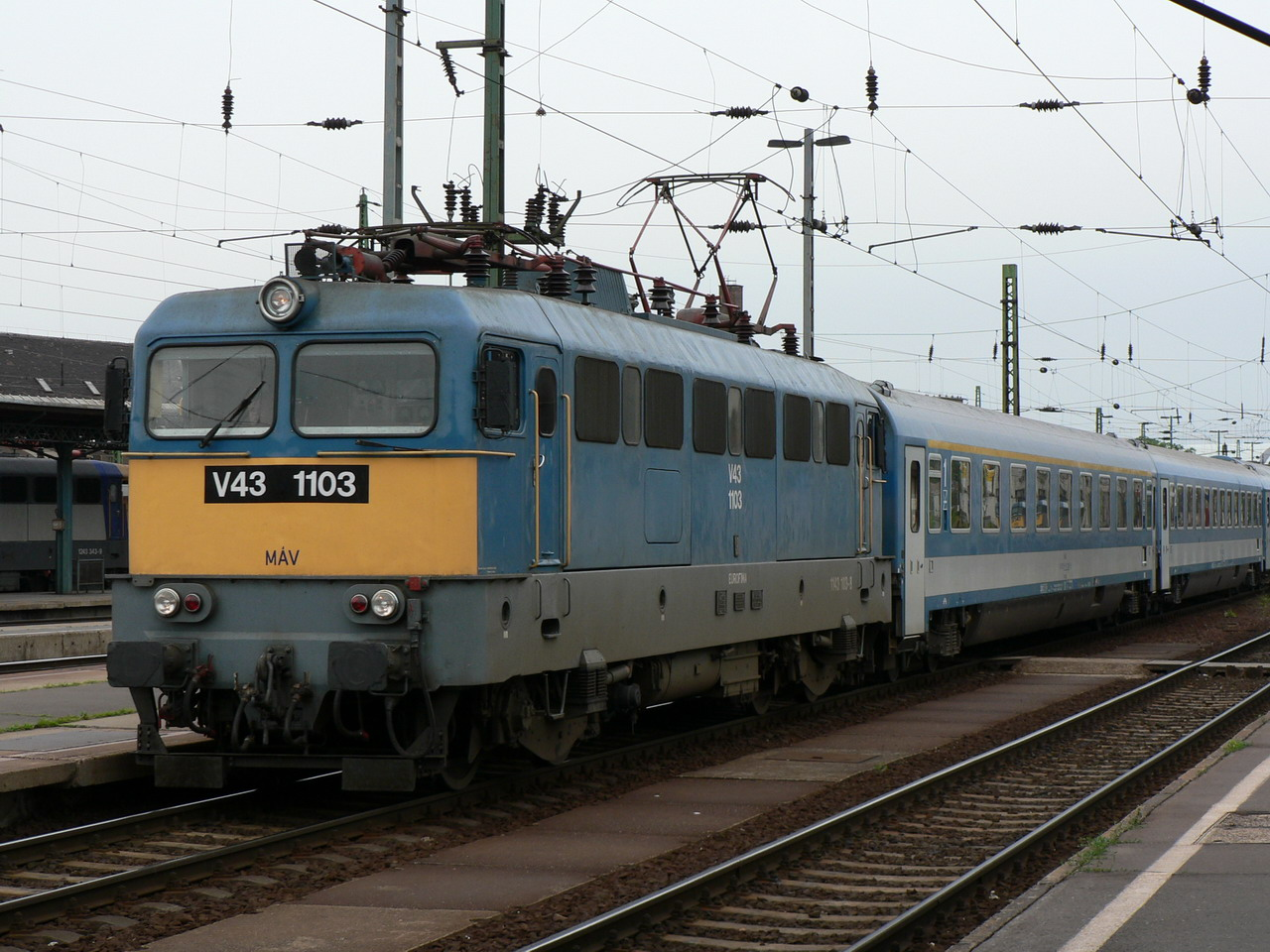 A MÁV V43 sorozat univerzális villamos mozdonya Budapest Keleti pályaudvaron